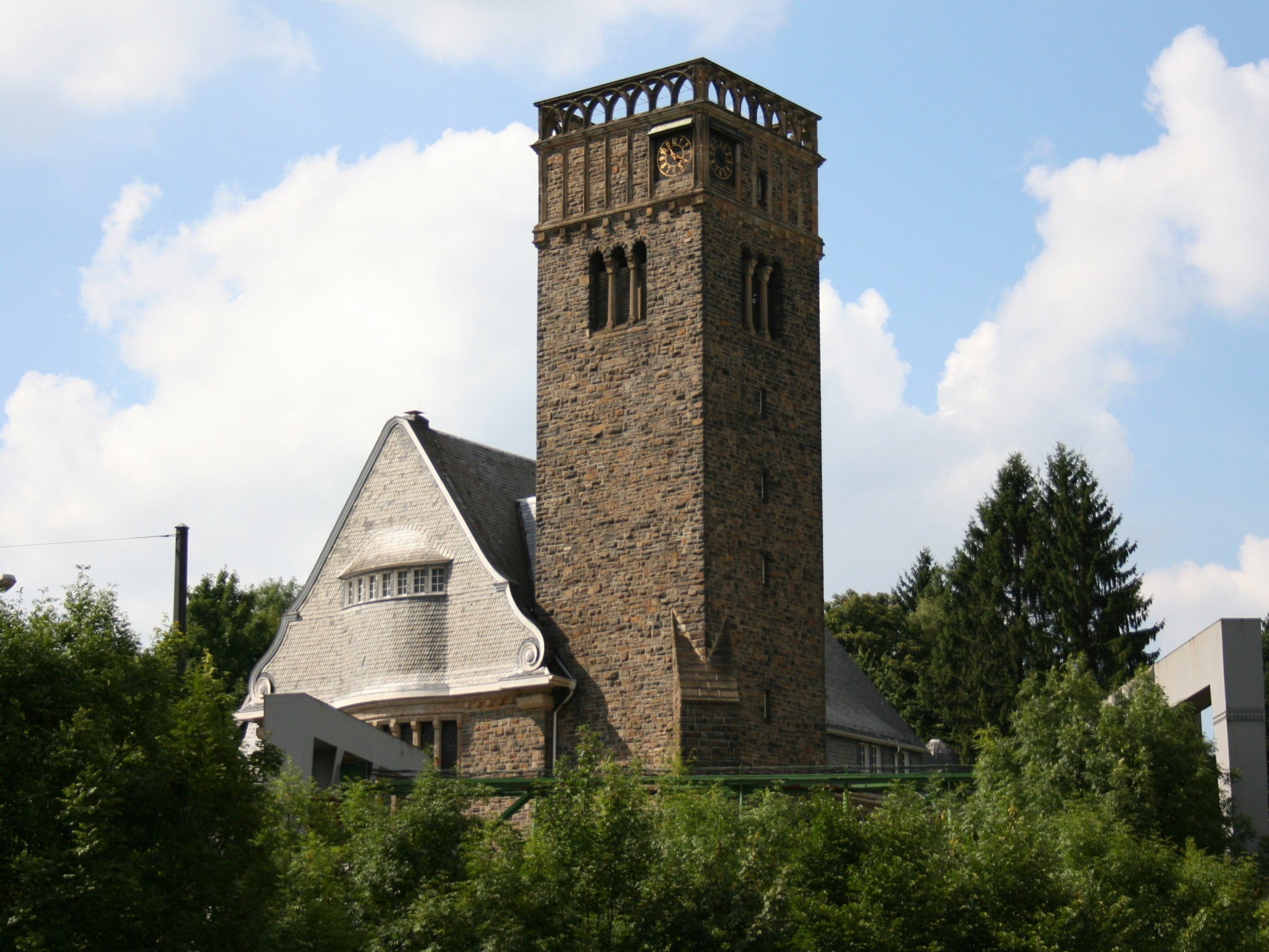 Hauptkirche Sonnborn in Wuppertal-Sonnborn